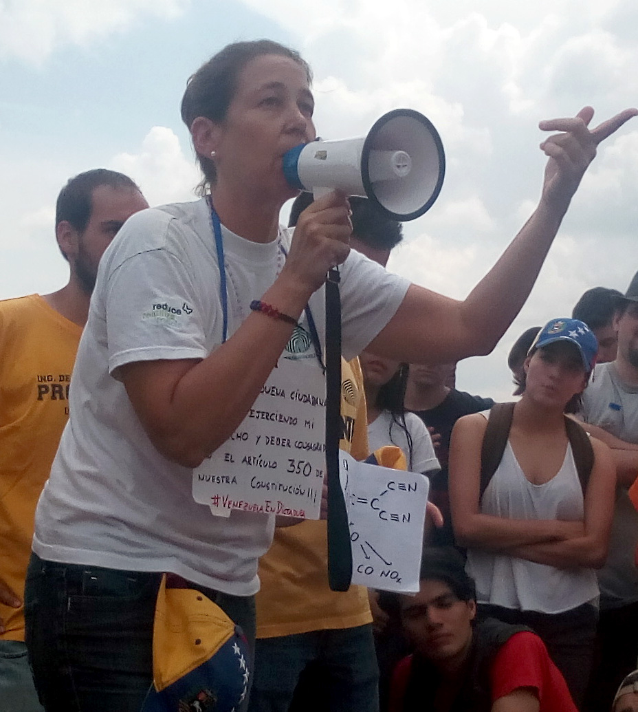 La profesora Mónica Kräuter dando una clase magistral sobre bombas lacrimógenas en un plantón durante las protestas en Venezuela de 2017